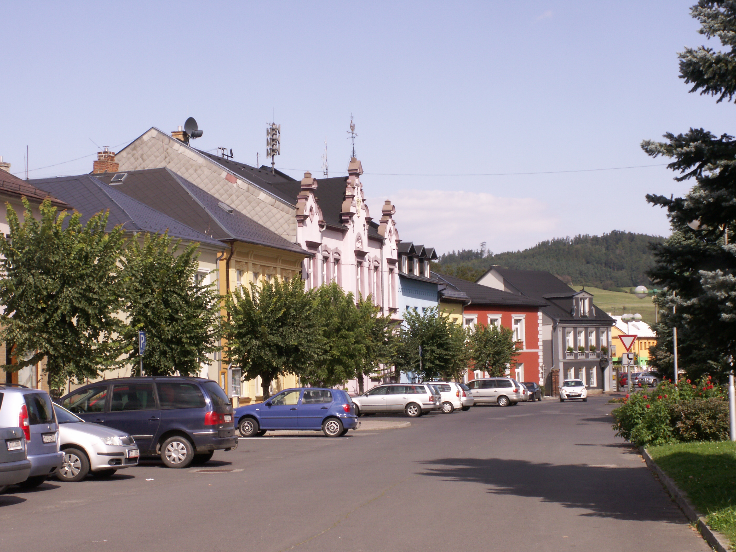 Město Albrechtice, okres Bruntál, náměstí ČSA